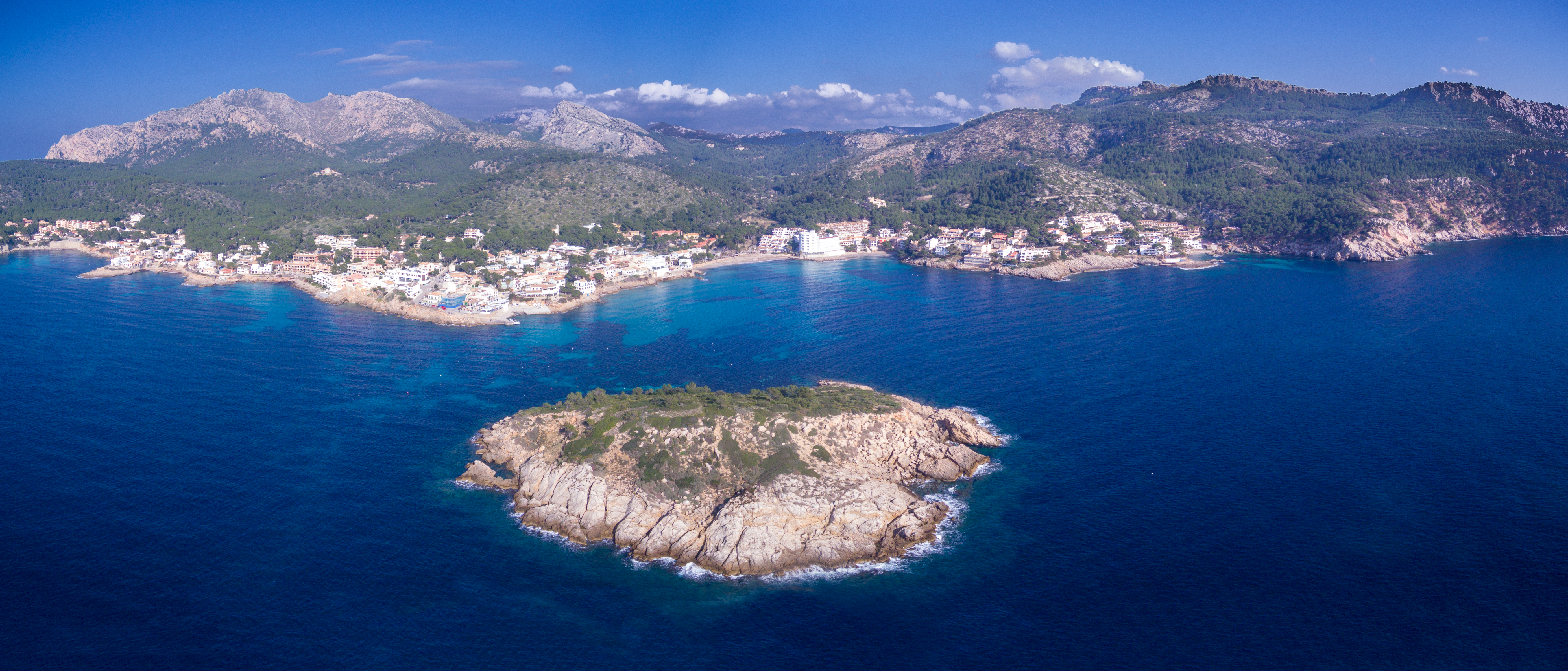 Panorámica de 5 fotografías hechas a 120m de altura y 500m de la costa.